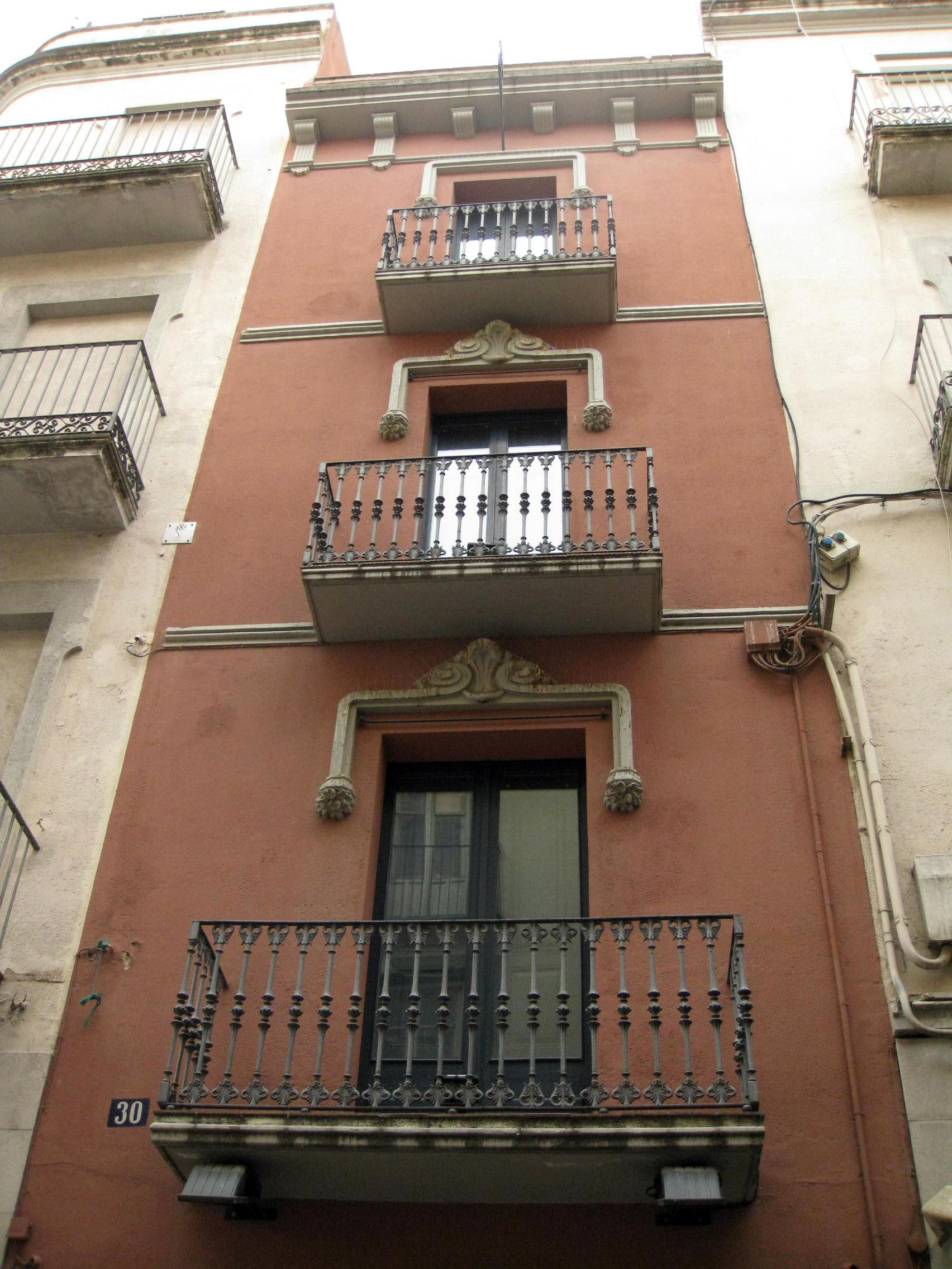 Casa al carrer Girona, 30 (Figueres)